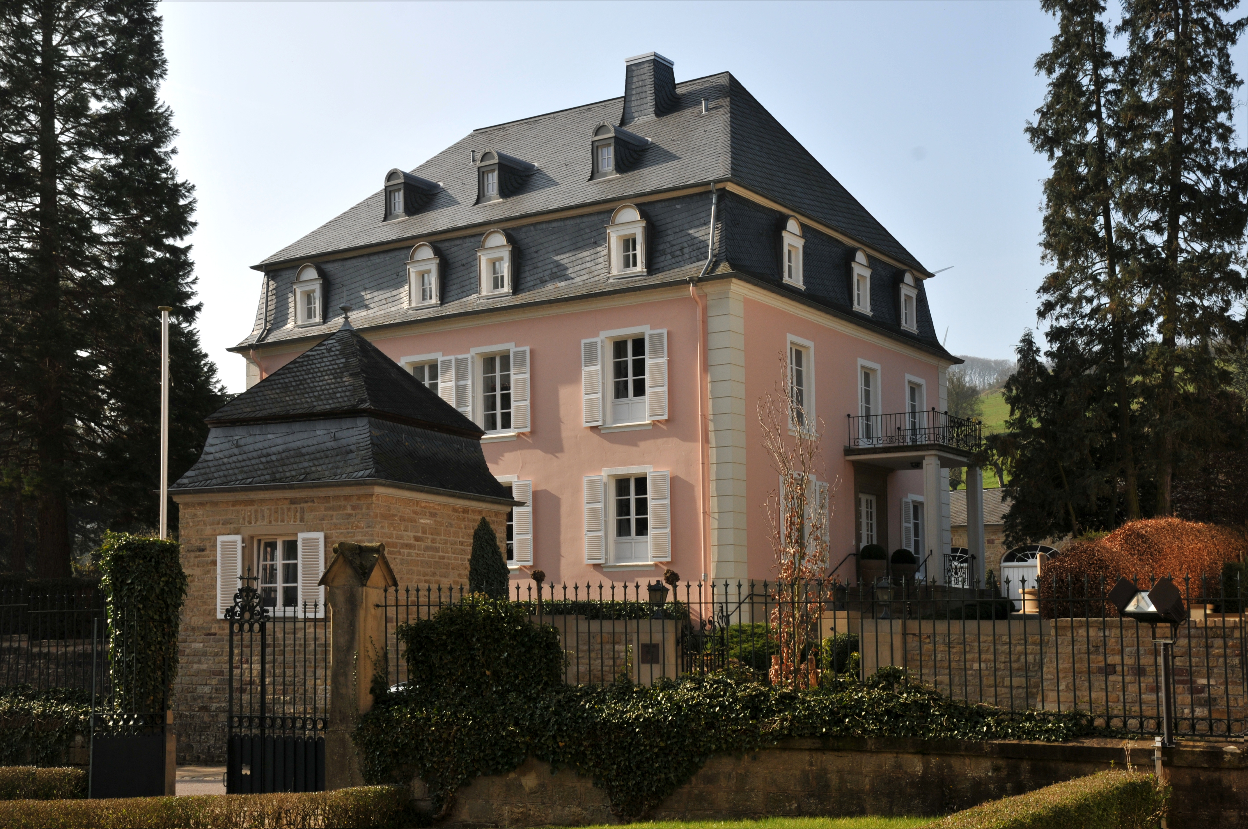 D'Schlass zu Bur.